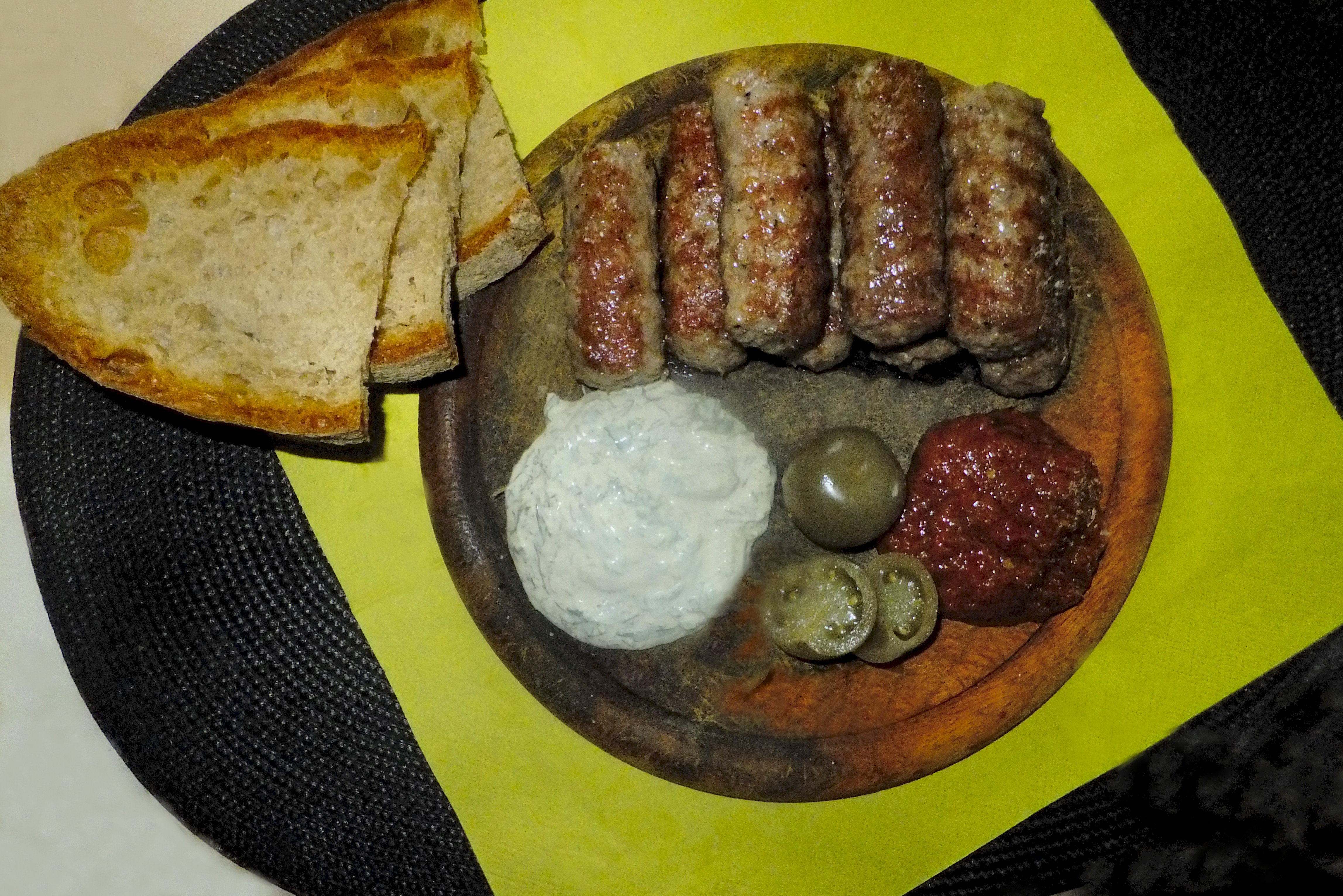 Mici cu carne de miel/Mititei mit Lammfleisch